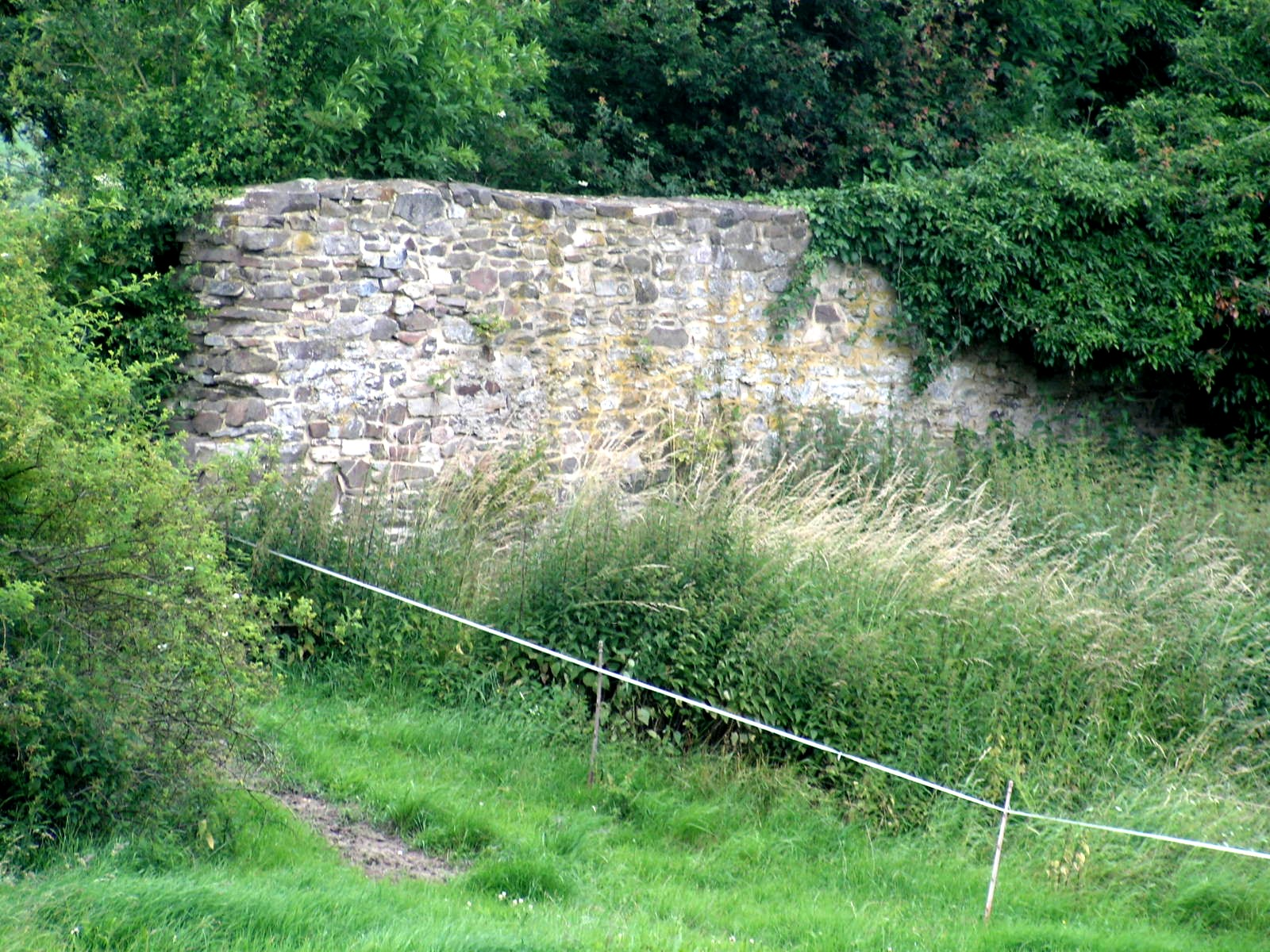 Kloster Caldern, Reste der Klostermauer (Ostabschluss des ehem. Klostergeländes)